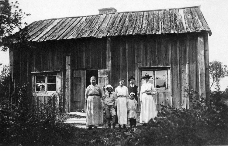 Torpet Igelbäcken, låg under Stens gård, Sten och Yttersten by, Järfälla kommun. Stående till vänster Maria Charlotta Johansson. (Maria Charlotta Nilsdotter (gift Johansson), född 1842-10-09, död 1927-04-28.)